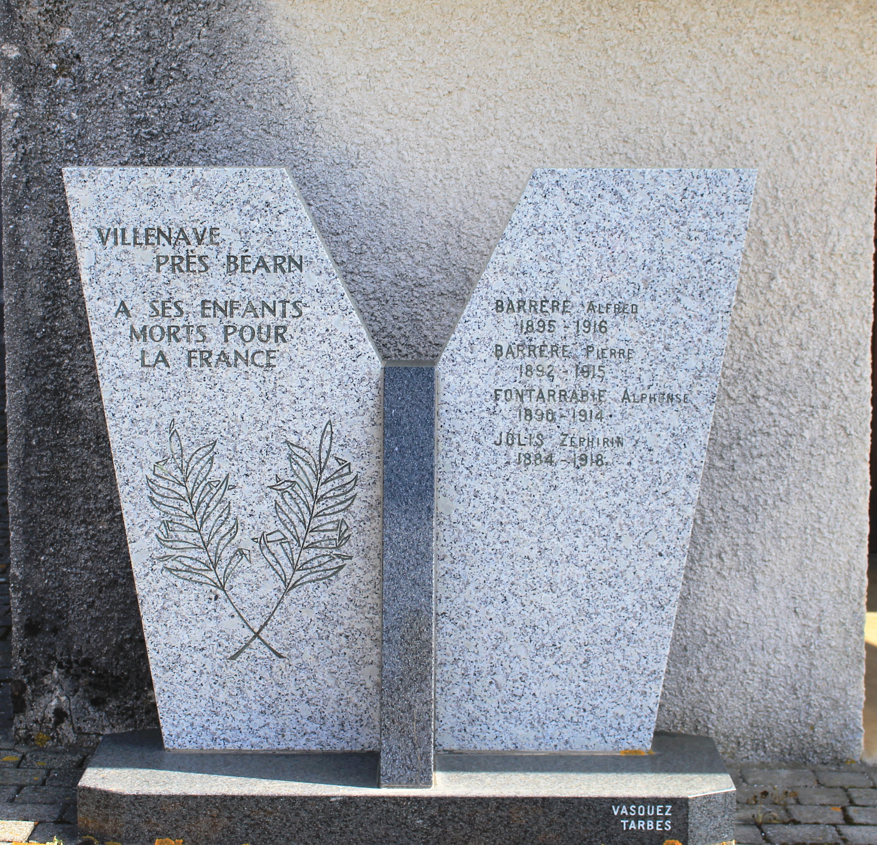 Monument aux morts de Villenave-près-Béarn (Hautes-Pyrénées)